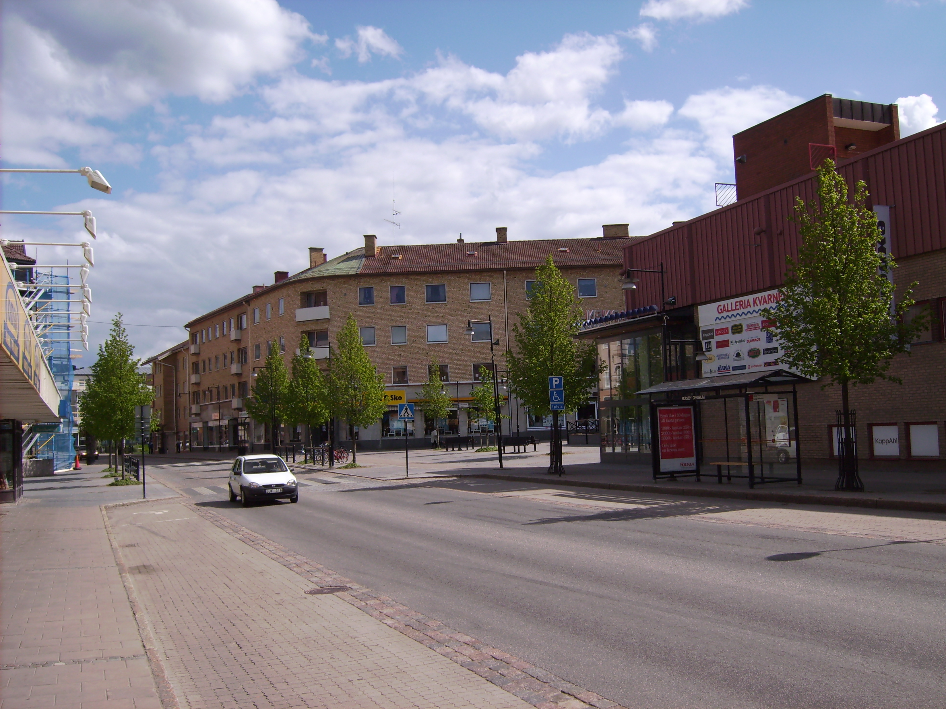 The main street – Kungsvägen - in Mjölby.